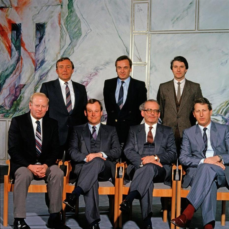 Offizielles Gruppenfoto der Vorarlberger Landesregierung Keßler V vom 28. Februar 1985.Vorne (v.l.n.r.): Konrad Blank, Siegfried Gasser, Herbert Keßler, Fredy Mayer Hinten (v.l.n.r.): Günter Vetter, Guntram Lins, Hans-Dieter Grabher